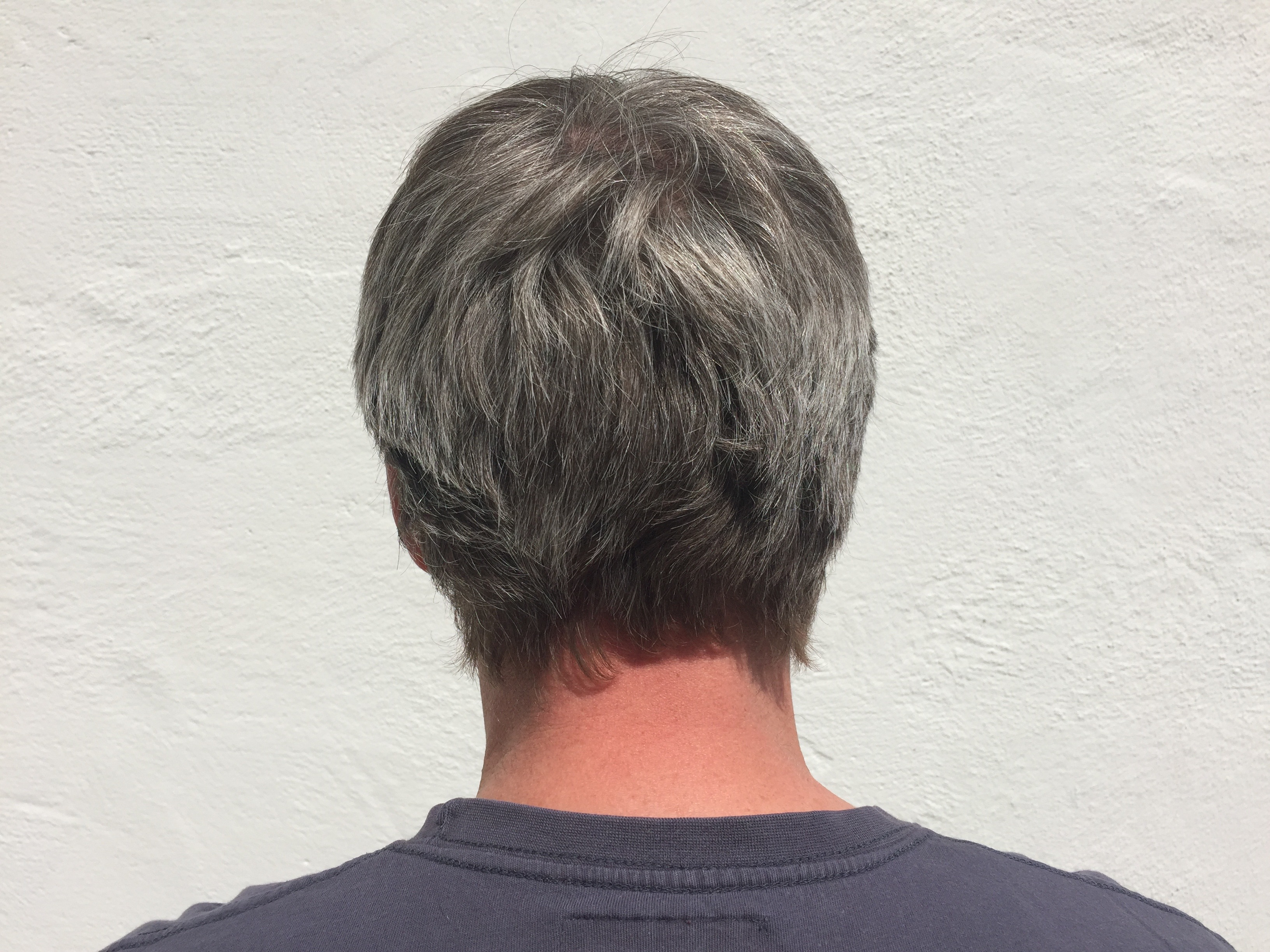 Jørgen Mehren i Forfatterne bak